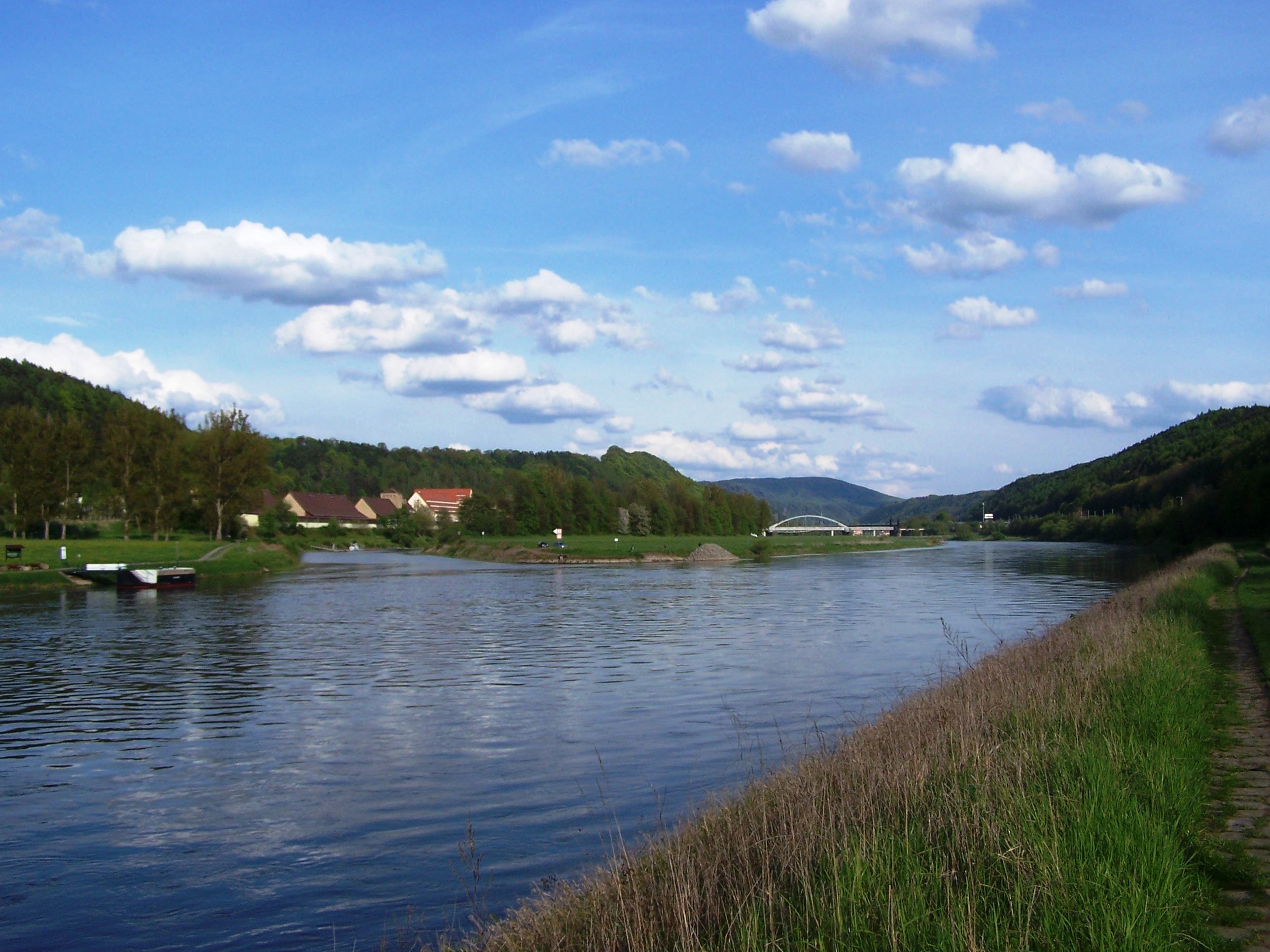 Blick Richtung Bad Schandau (rechts hinter der Brücke), Sächsische Schweiz. Links Einfahrt des Schutzhafens Prossen